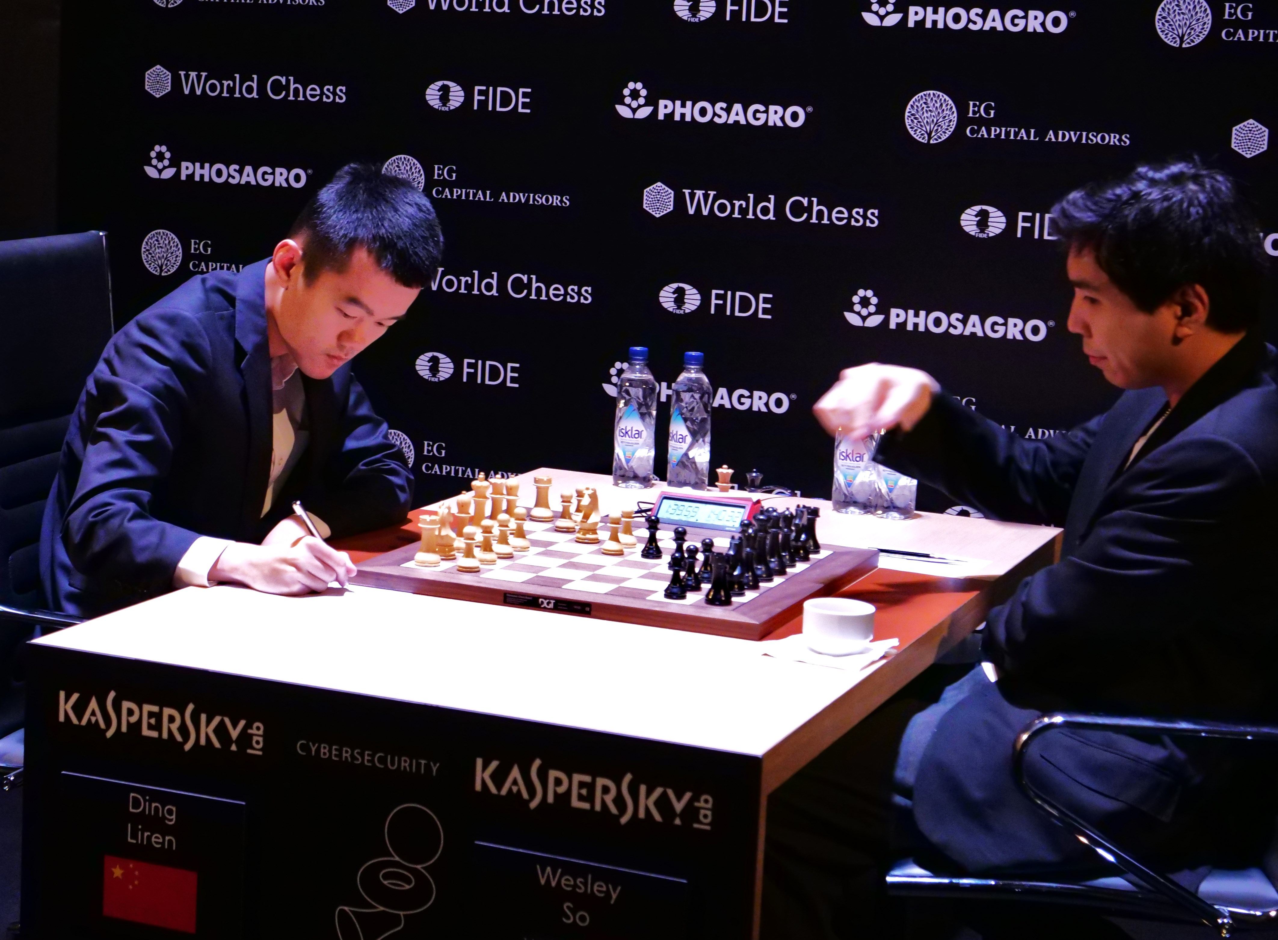 Liren Ding (li.) und Wesley So, Kandidatenturnier Berlin 2018, 10. Runde